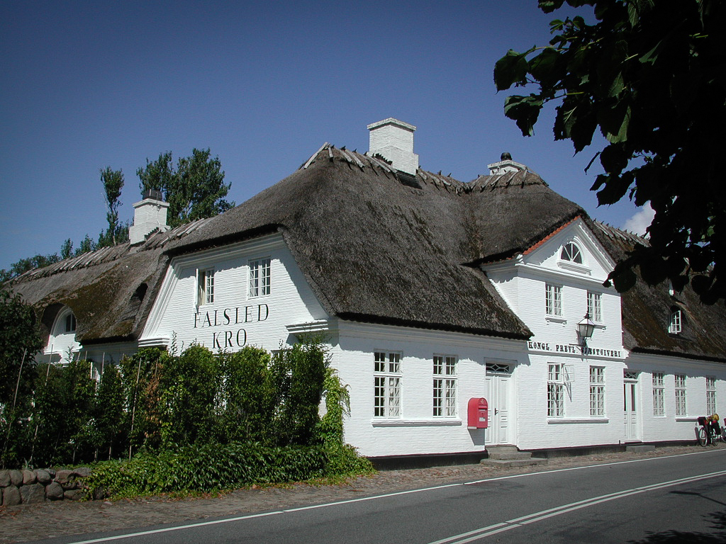 Falsled Kro, Fyn, Denmark